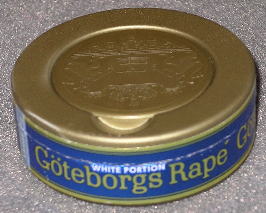 Packung Snus der Marke Göteborgs Rapé (white portion) von Sweden Match